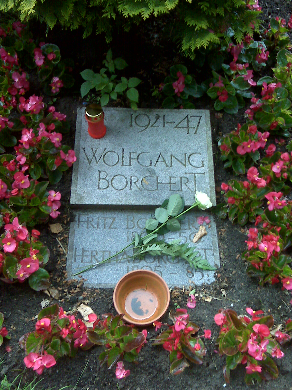 Grabstein des Schriftstellers Wolfgang Borchert auf dem Ohlsdorfer Friedhof